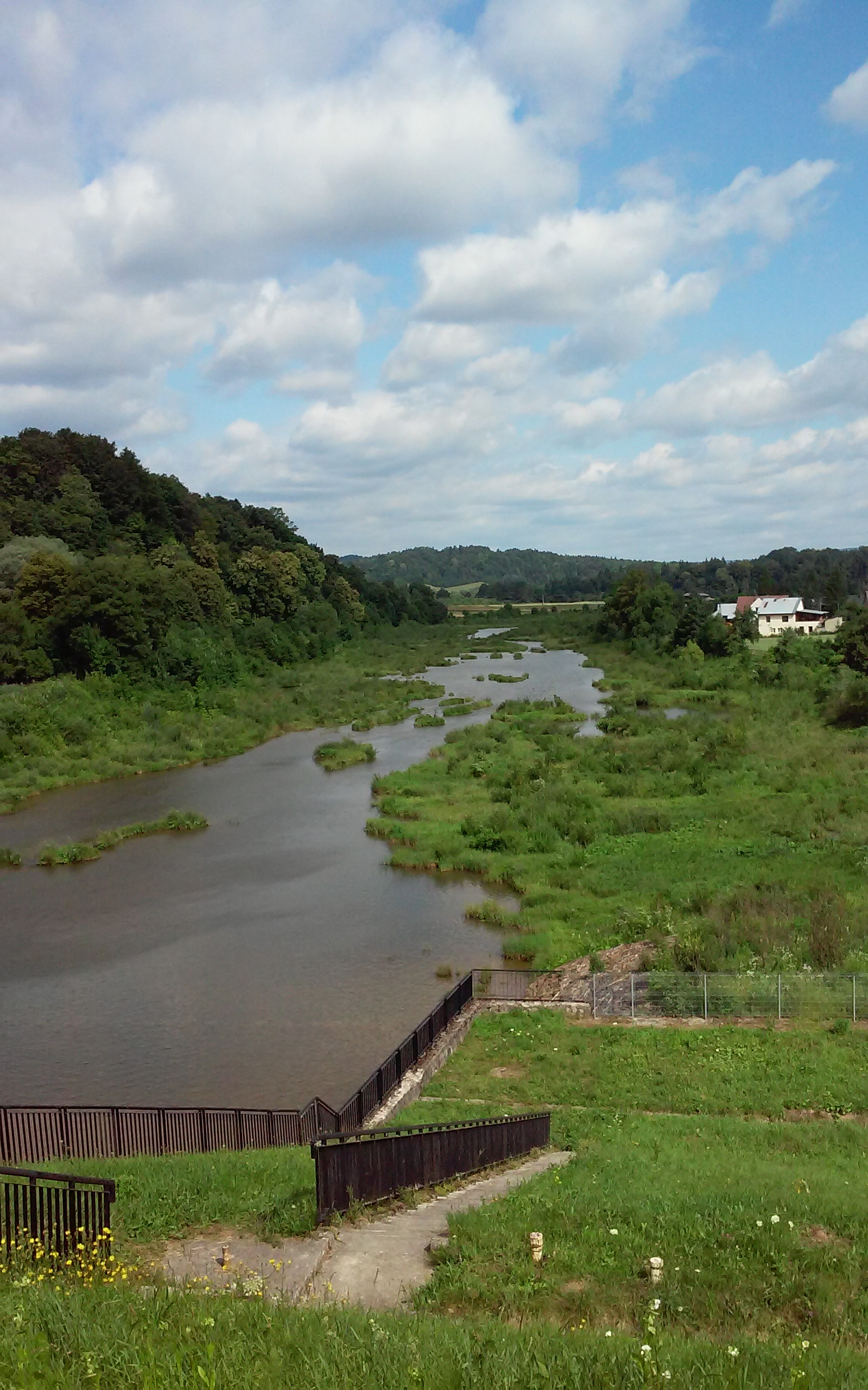 San wypływający z Jeziora Myczkowskiego w Myczkowcach